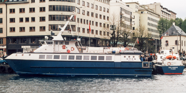 MS Hyen og MS Solundir ved Standkaien i Bergen i 1986.